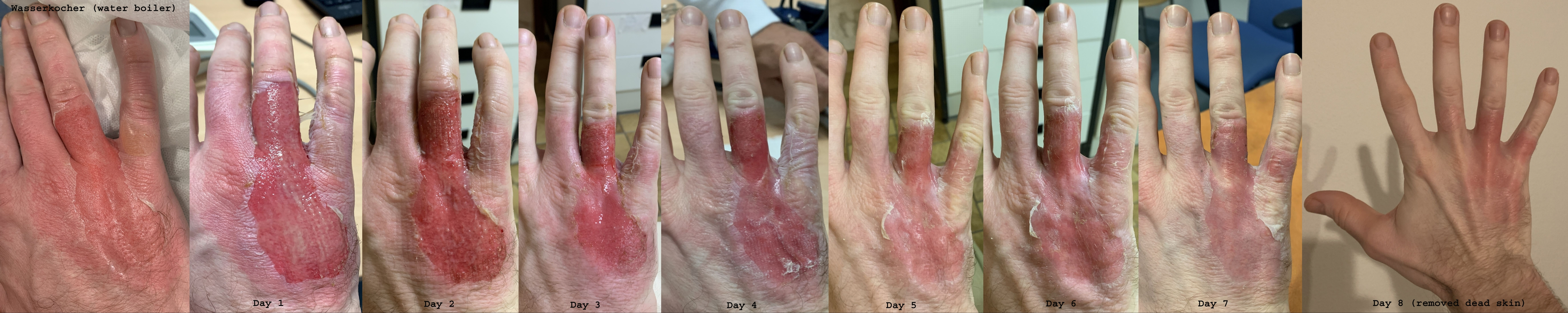 Verbrennung durch 100 Grad heißes Wasser